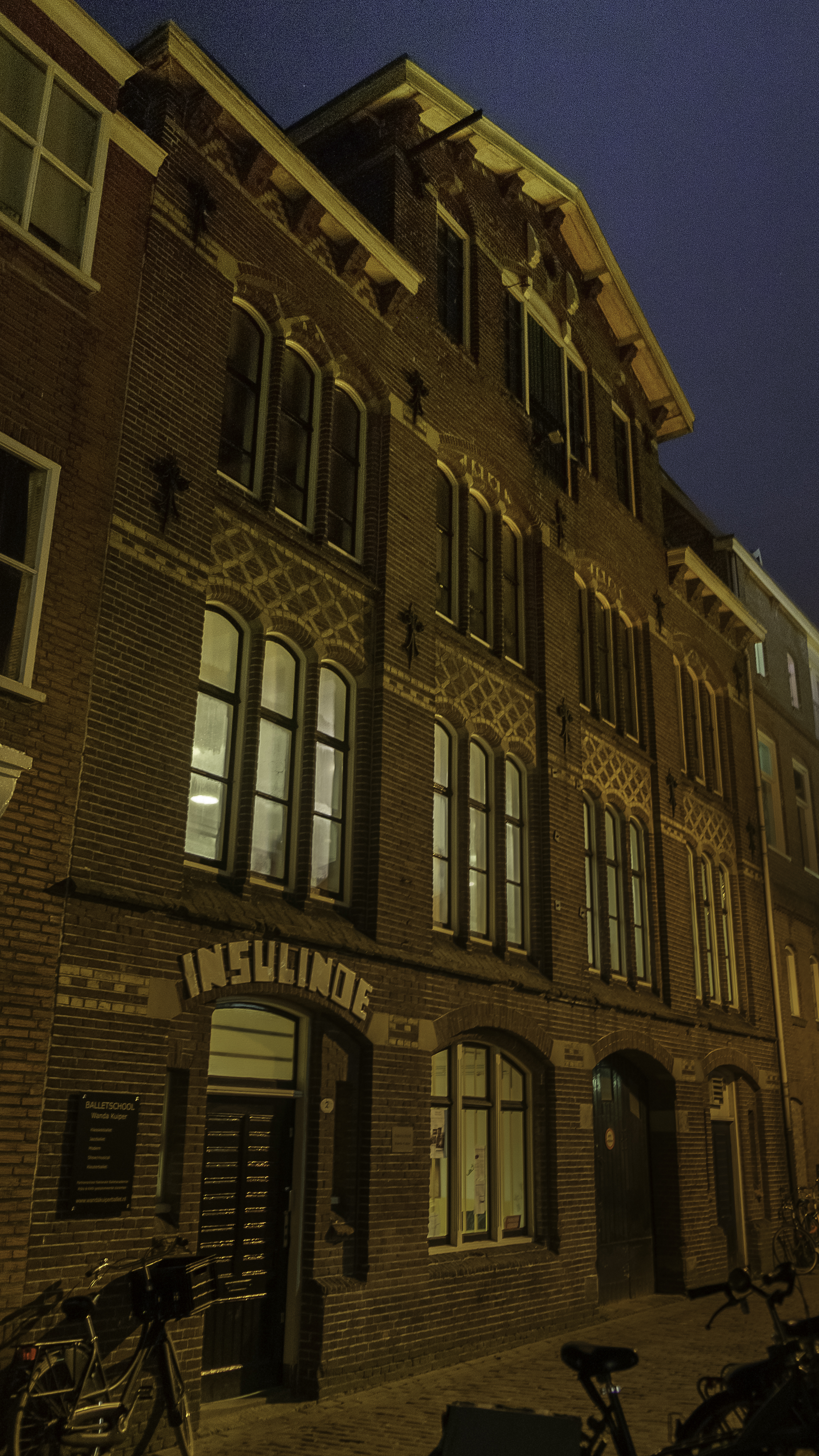 fabriekspand Insulinde (voormalige tabaksfabriek en voormalige koffiebranderij en theefabriek)